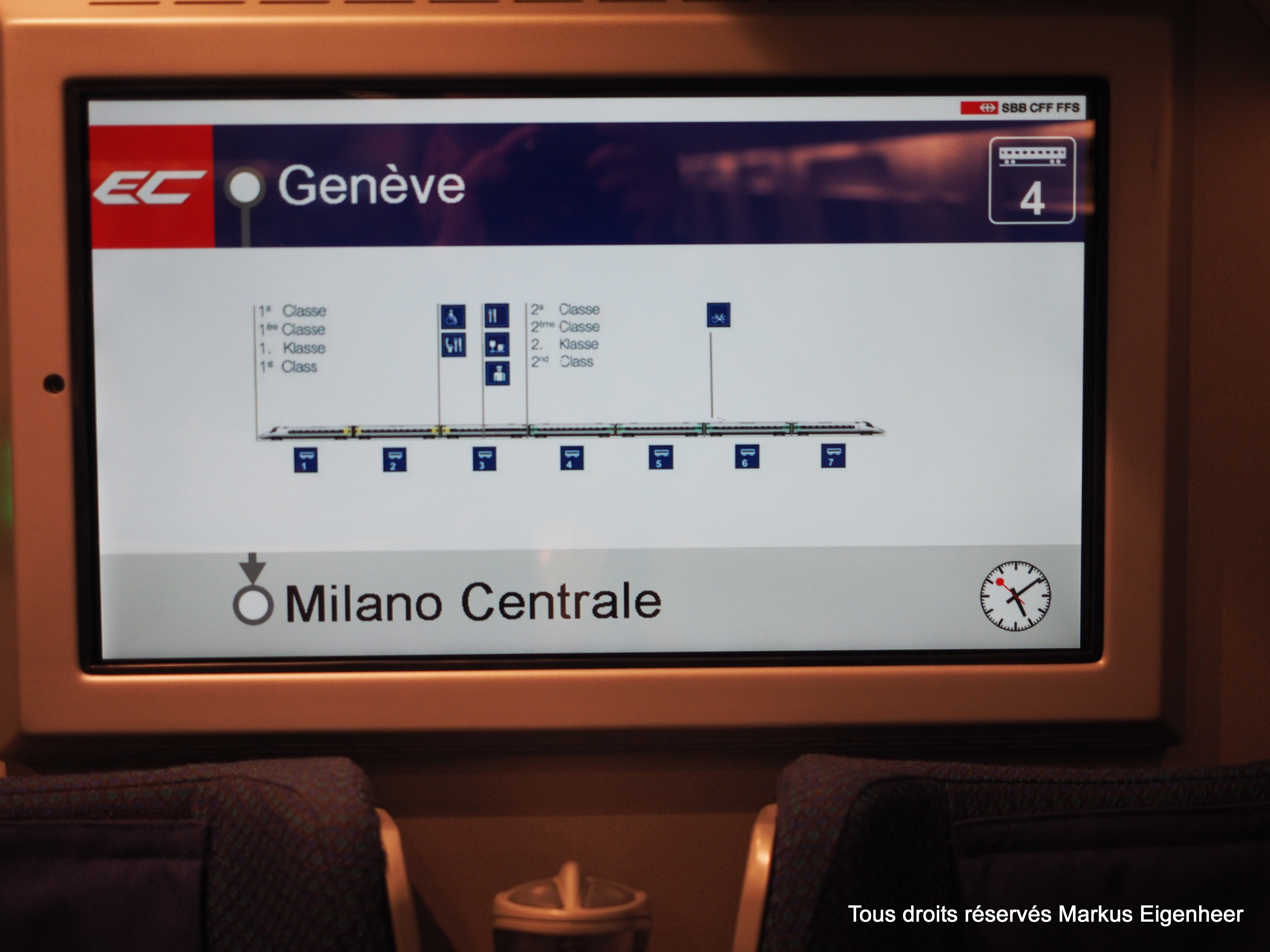 Genève 29.11.2014